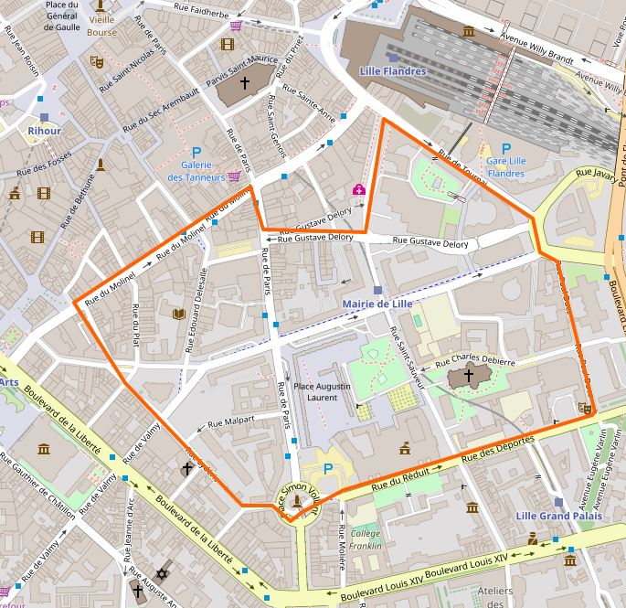 Espace du quartier historique de Lille-Saint-Sauveur sur plan actuel